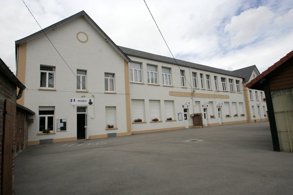 Buire-le-Sec mairie école